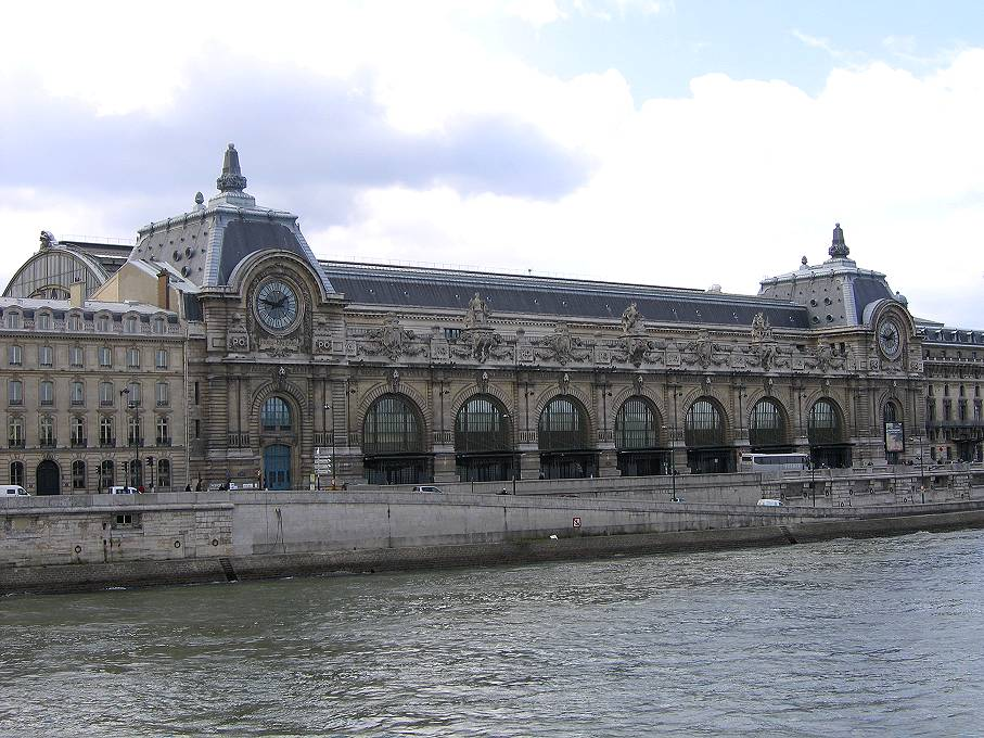 Musée d'Orsay, vom Pont Royal aus gesehen.